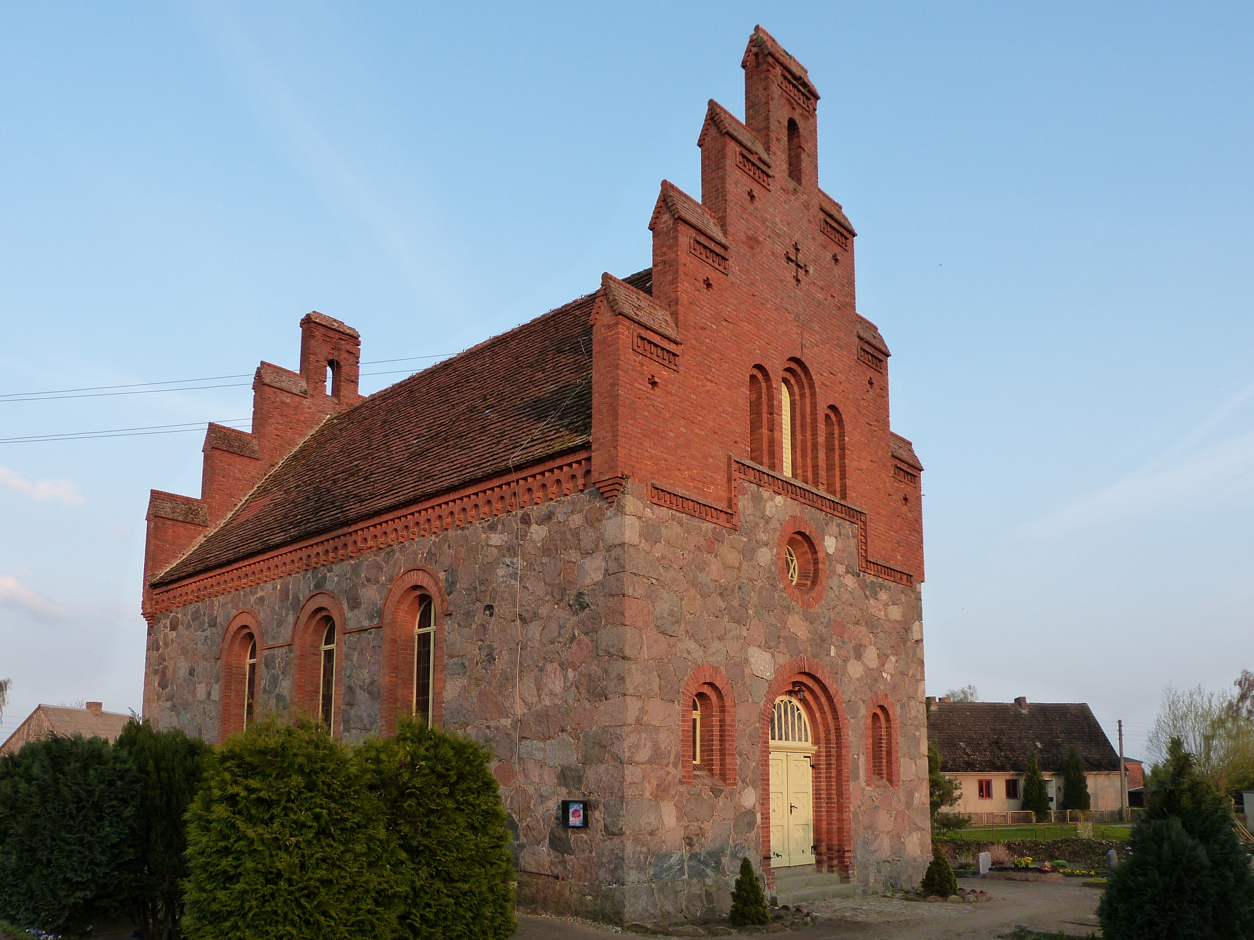 Kirche in Wegezin, Gemeinde Krien, Ansicht von Nordwesten